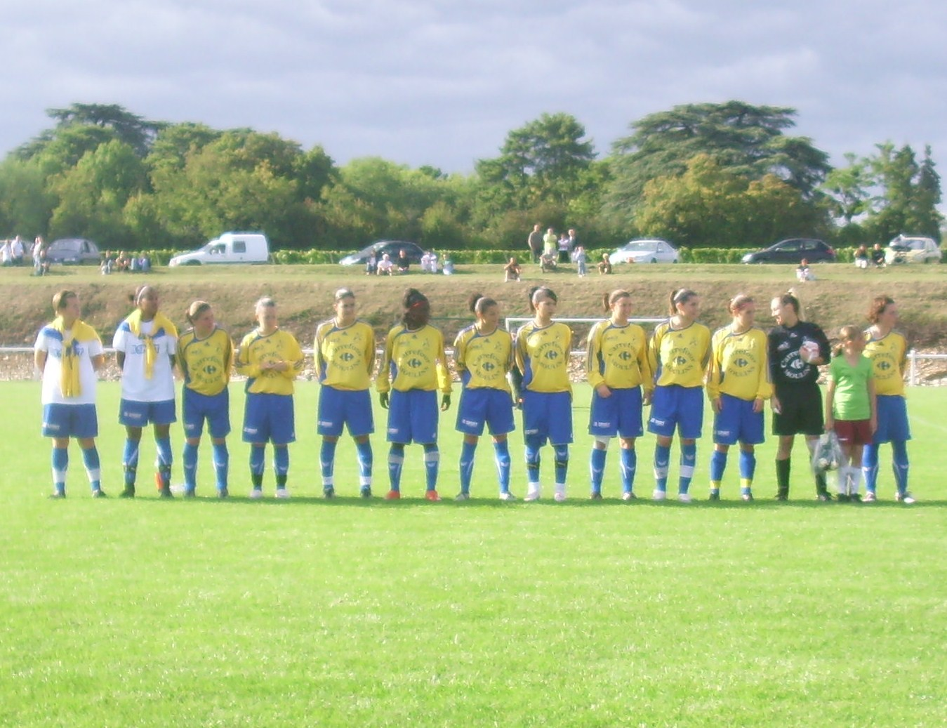 Juvisy contre Nord Allier Yzeure en match amical à Mercurey (71)